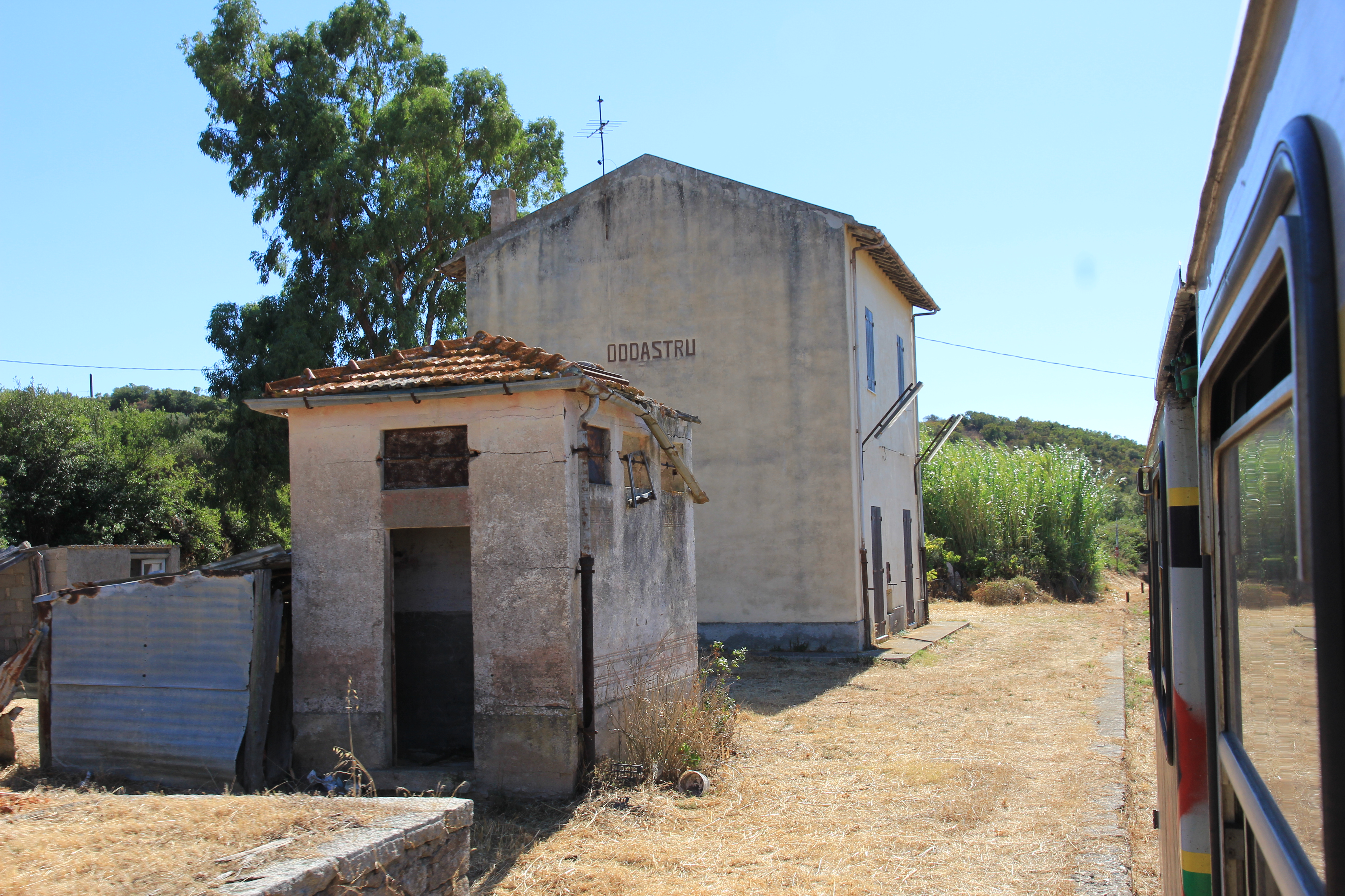 Arzachena, stazione ferroviaria di Oddastru